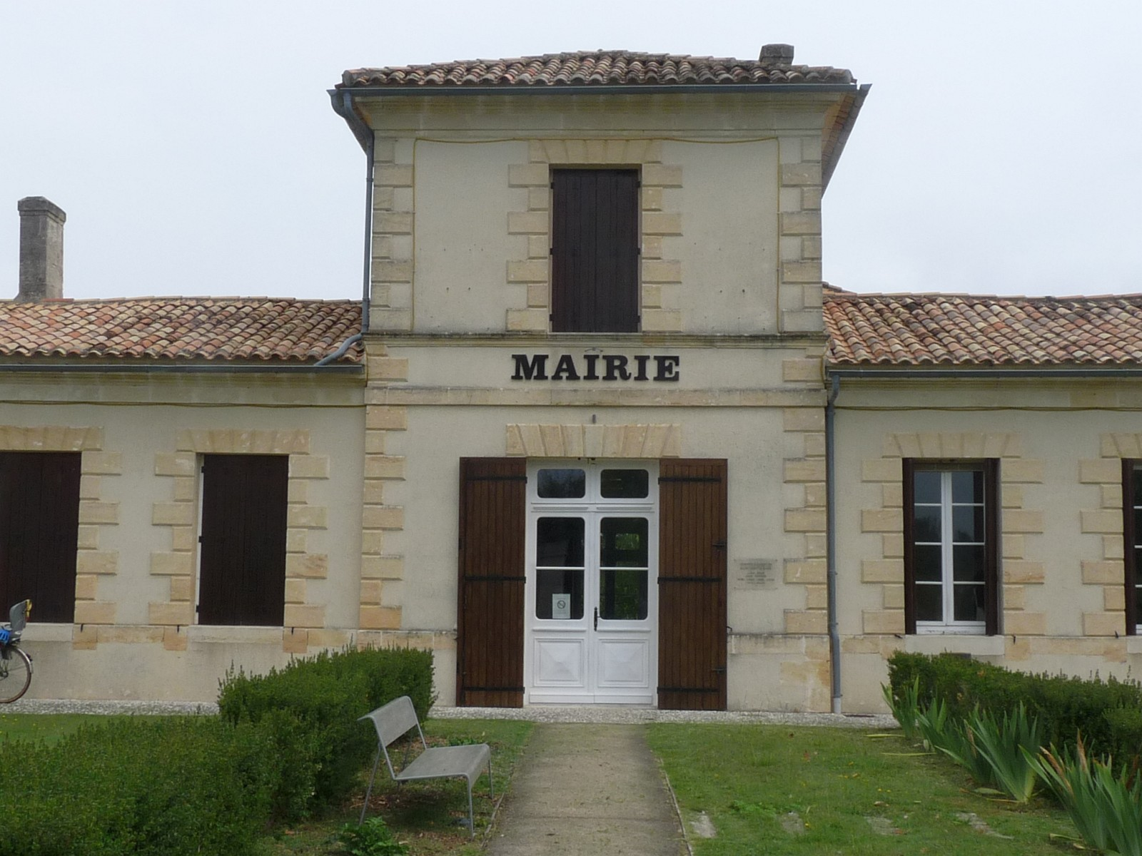 Mairie de Cartelègue,Gironde, France